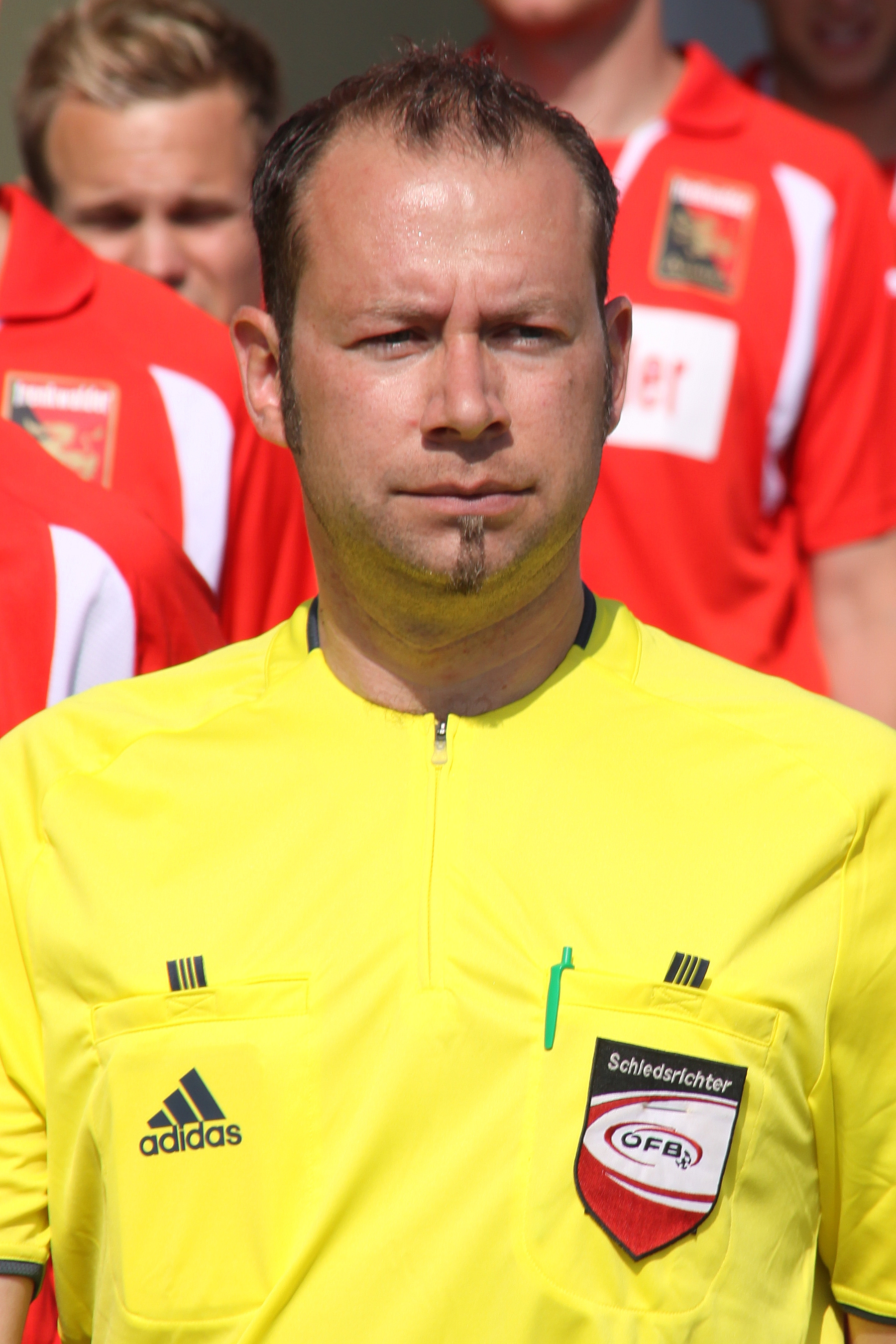 Thomas Gangl - Fußballschiedsrichter (hoch)